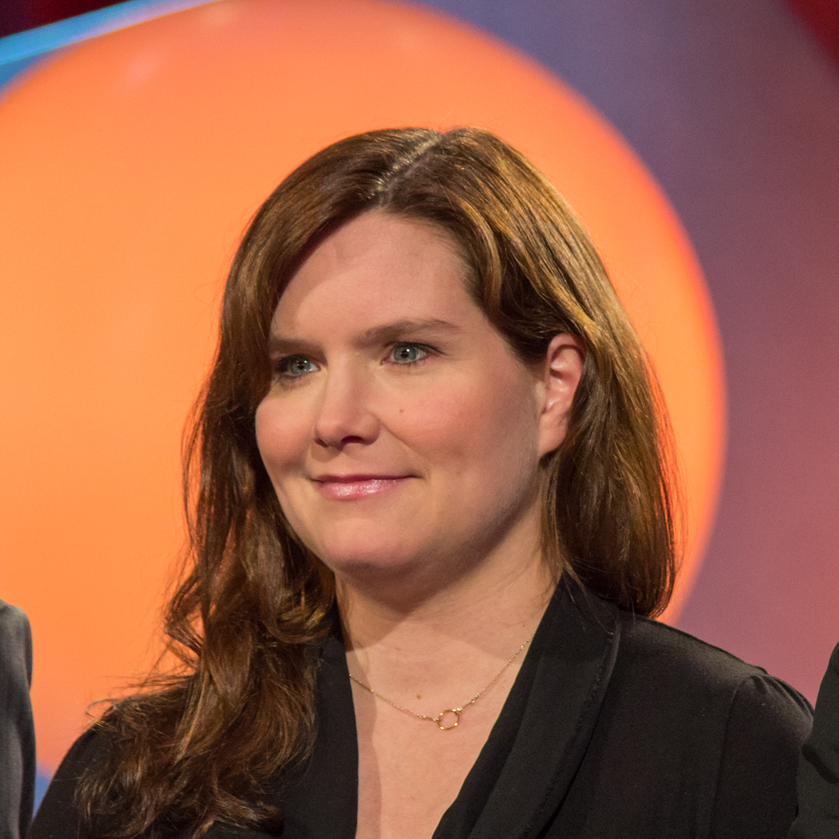 Eva Müller, Preisträgerin ds Hanns-Joachim-Friedrich-Preises 2013